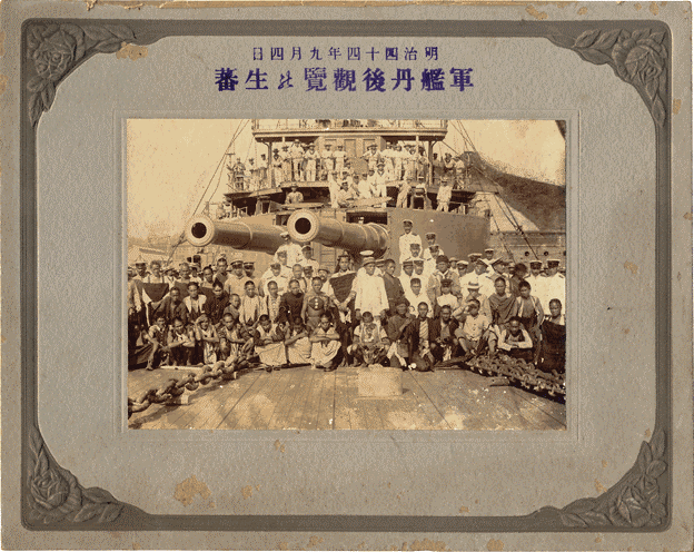 中文（台灣）: 背面書有「生蕃三十九名、手下者七八萬人」等字樣。 (軍艦丹後觀覽生蕃